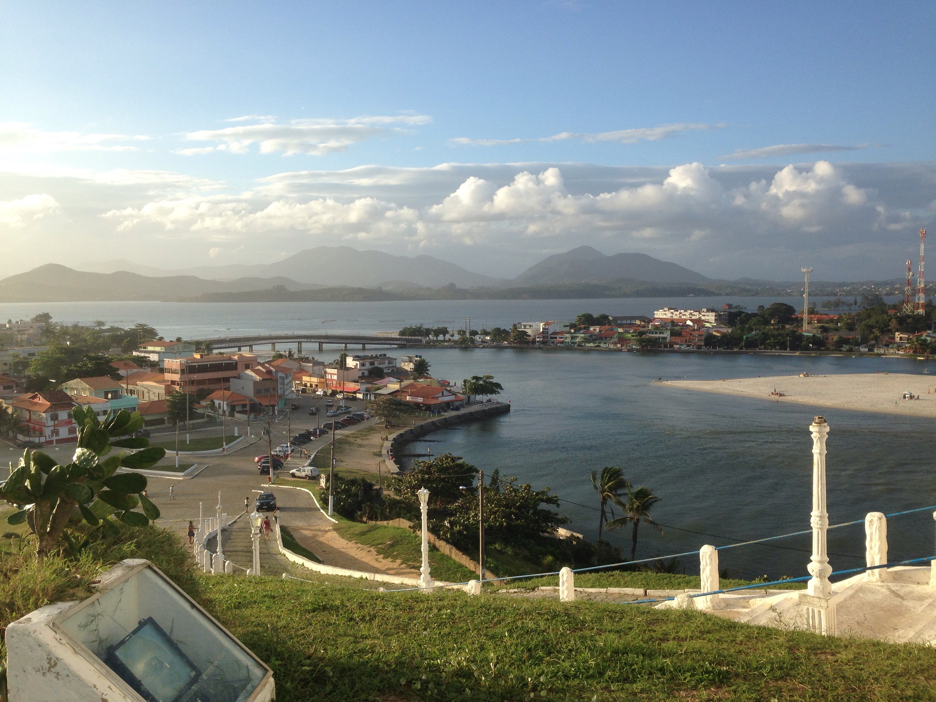 A Igreja de Nossa Senhora de Nazareth foi originalmente construída em 1662, passou por reformas em 1820 e é uma das construções mais antigas da região de Saquarema, na região litorânea do Rio de Janeiro. De lá, é possível ter uma visão da cidade, composta por lagoas e praias que atraem turistas de todos os lugares.